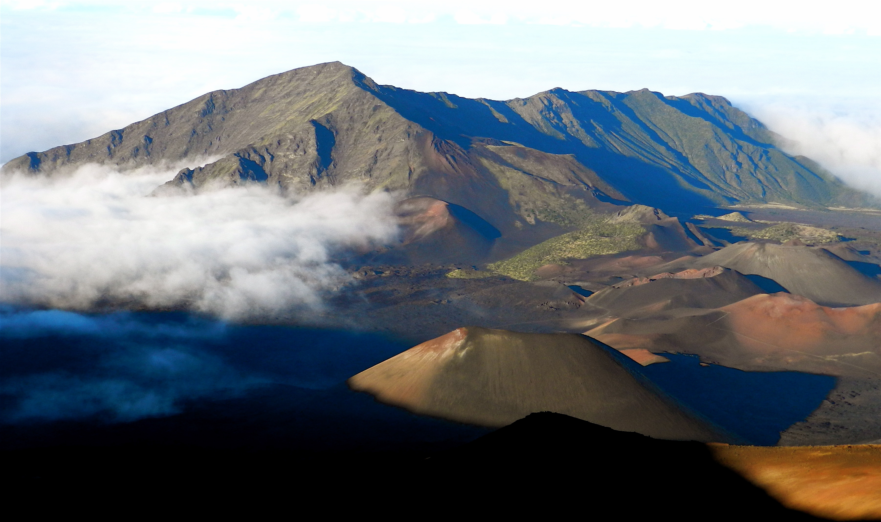 Haleakalā, Peak Shadow.